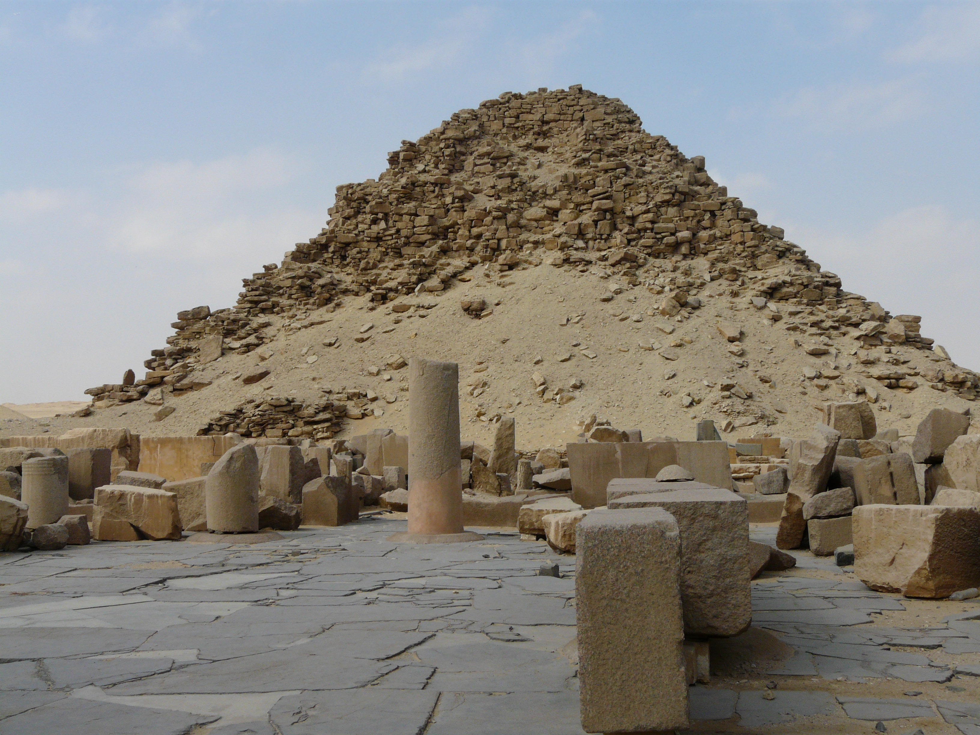 Complexe funéraire de Sahourê (Ve dynastie): vestiges du temple et de la pyramide - Site d'Abousir